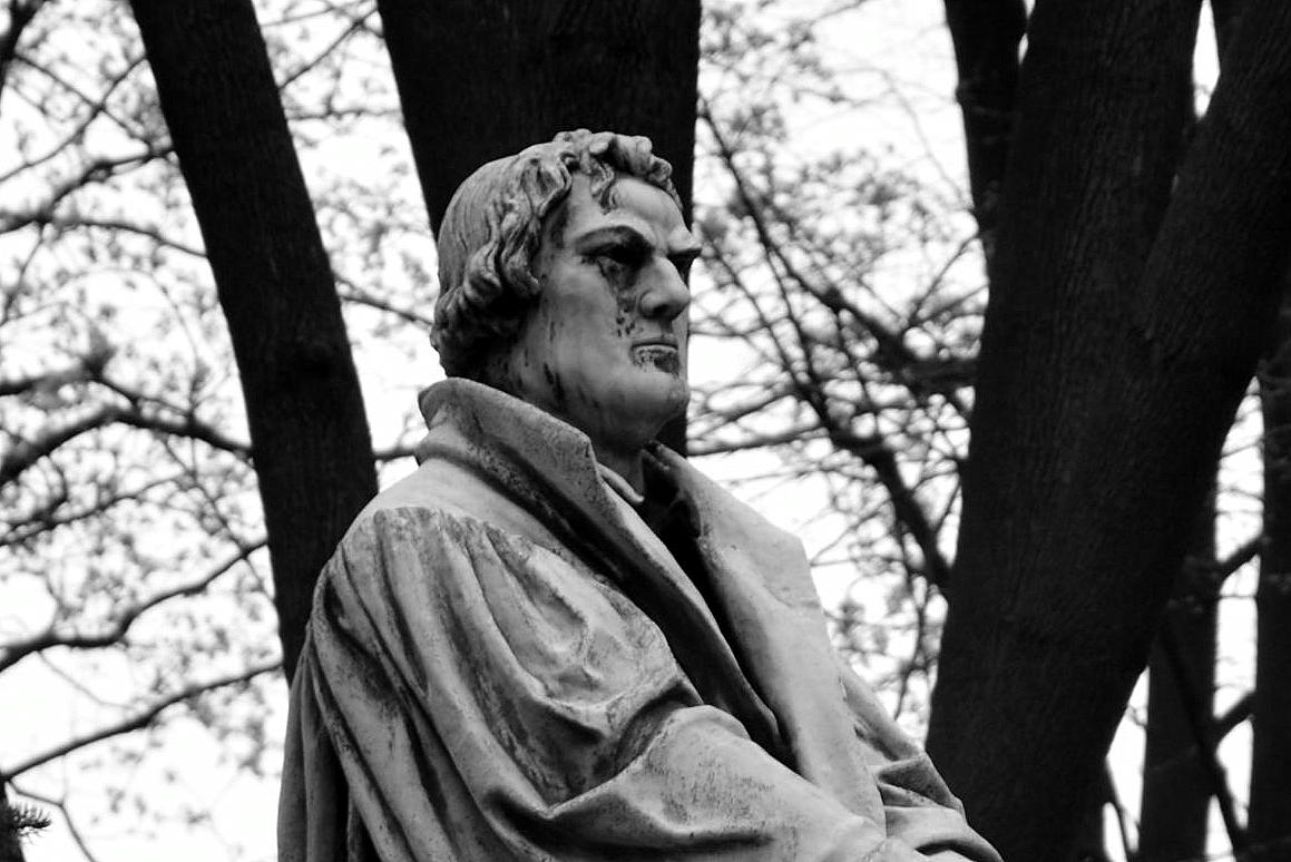 Statue of Martin Luther in Bielsko-Biała